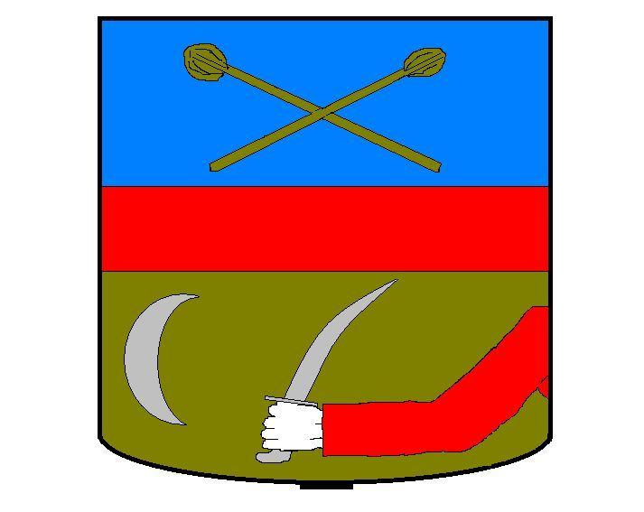 Grb generala Ivana Antona Kumbata iz Kaštel Štafilića